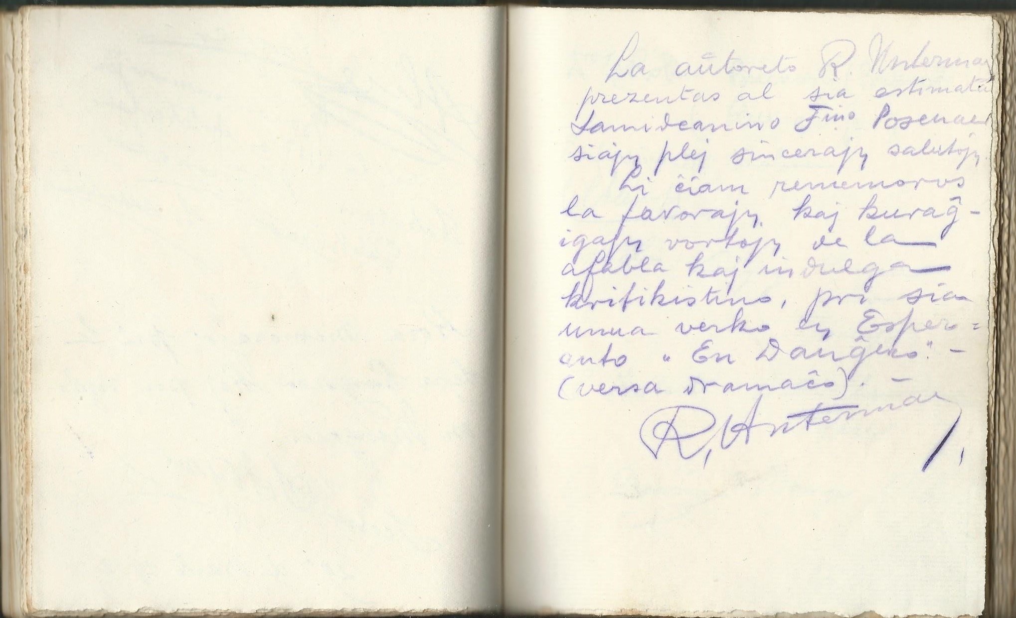 Skribo kaj subskribo de R. Unterman (en kongresa notlibro de Maria Posenaer)